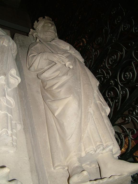 Grabstätte Ludwig III.